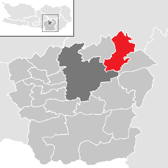 Bezirk Klagenfurt-Land